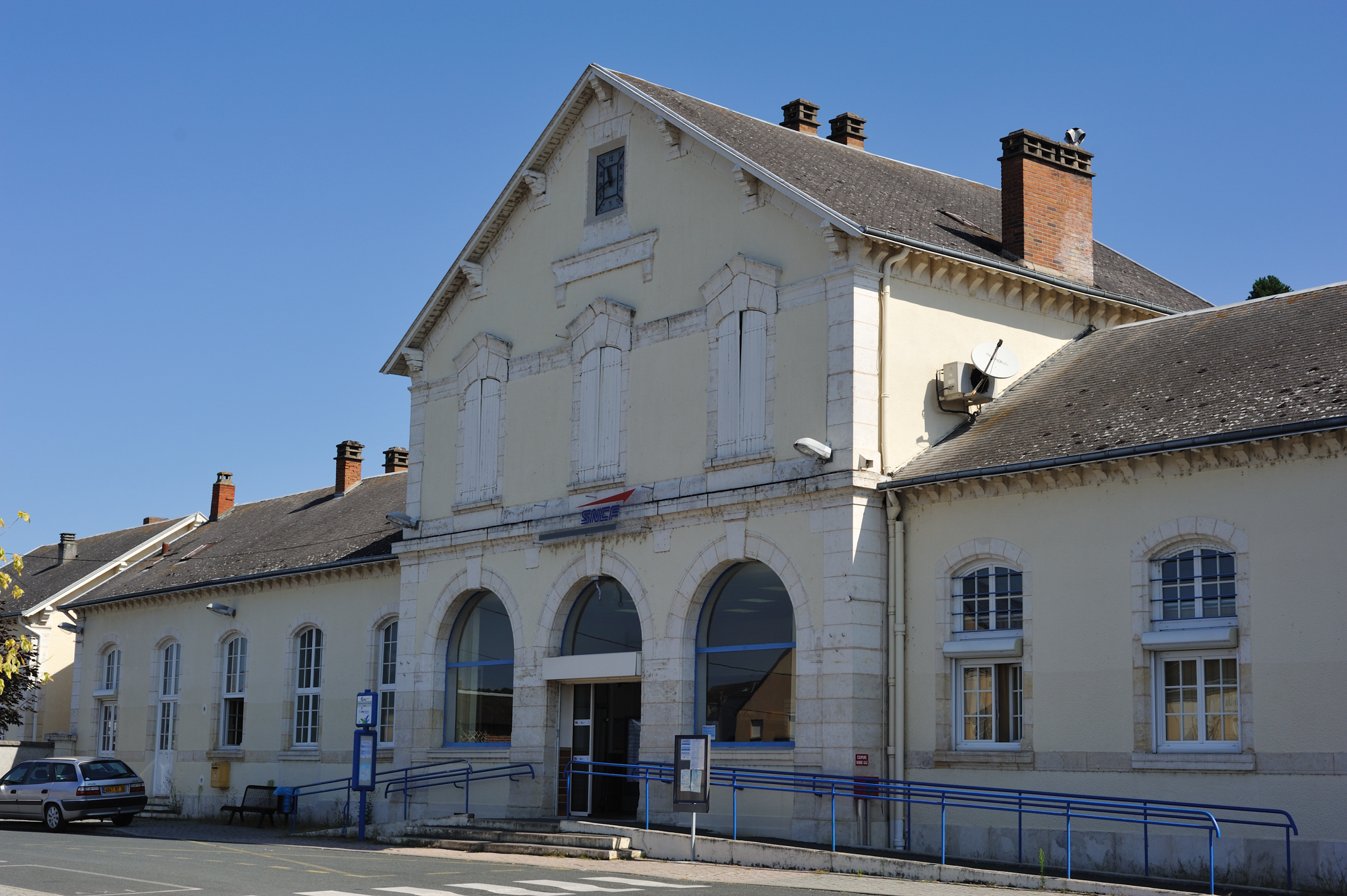 Gare d'Argenton-sur-Creuse, Indre, France